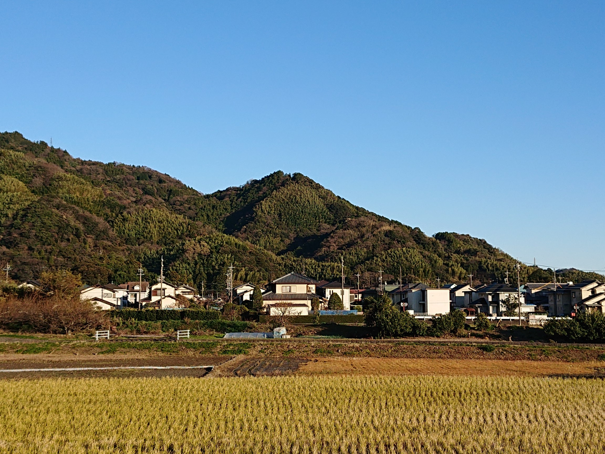 高草山中腹にある方ノ上城の跡（石合山）2020年1月1日